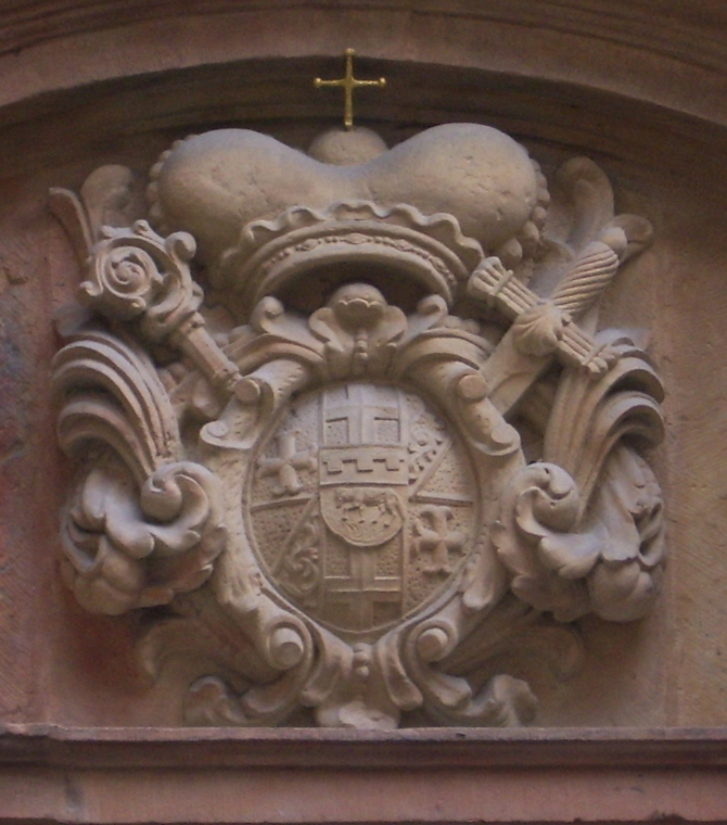 Wappenstein mit dem Wappen des Paderborner Fürstbischofs Hermann Werner von Wolff Metternich zur Gracht über dem Kirchenportal des Michaelsklosters Paderborn